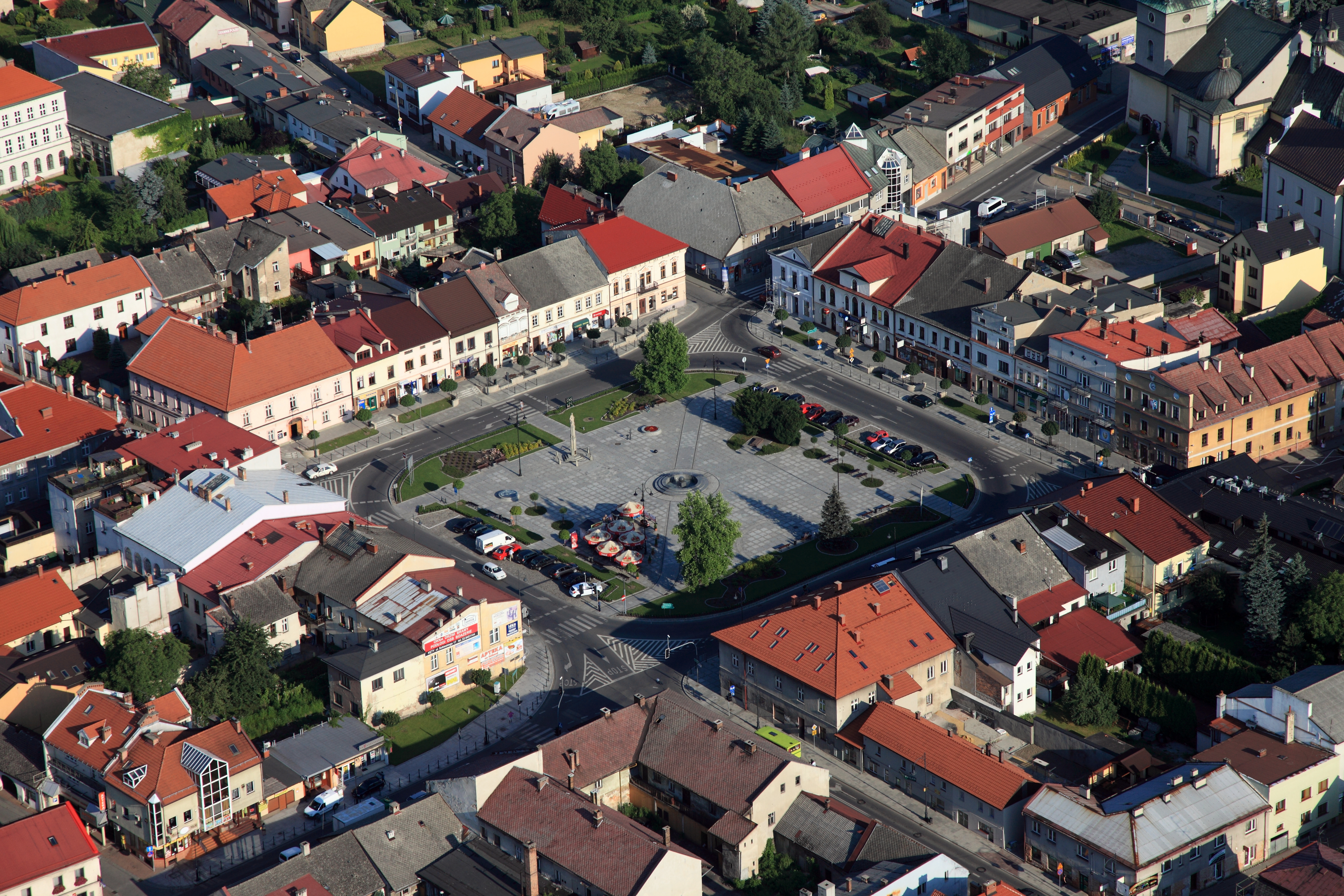 Rynek w Kętach z lotu ptaka